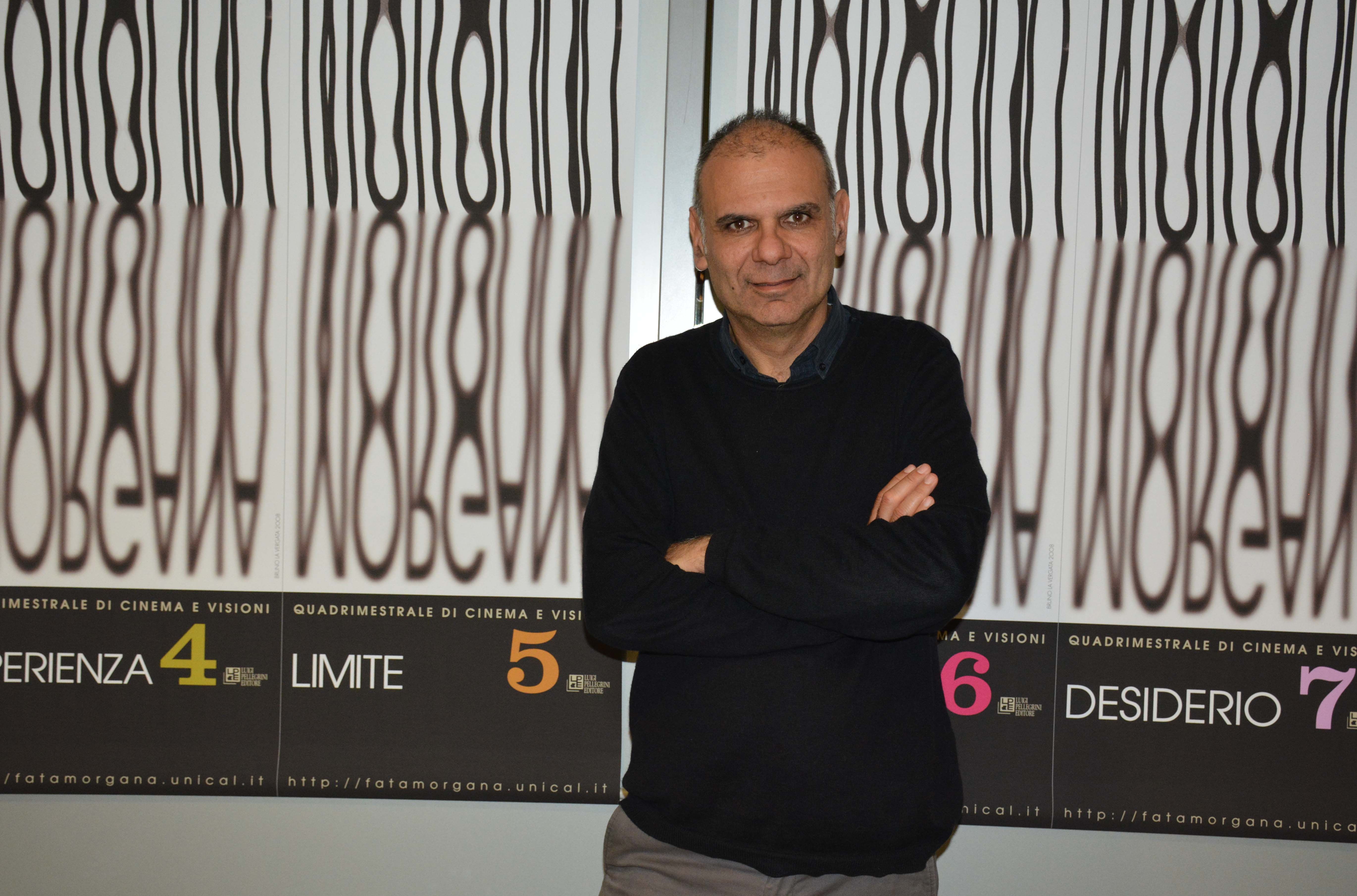 Roberto De Gaetano (Decennale di Fata Morgana)